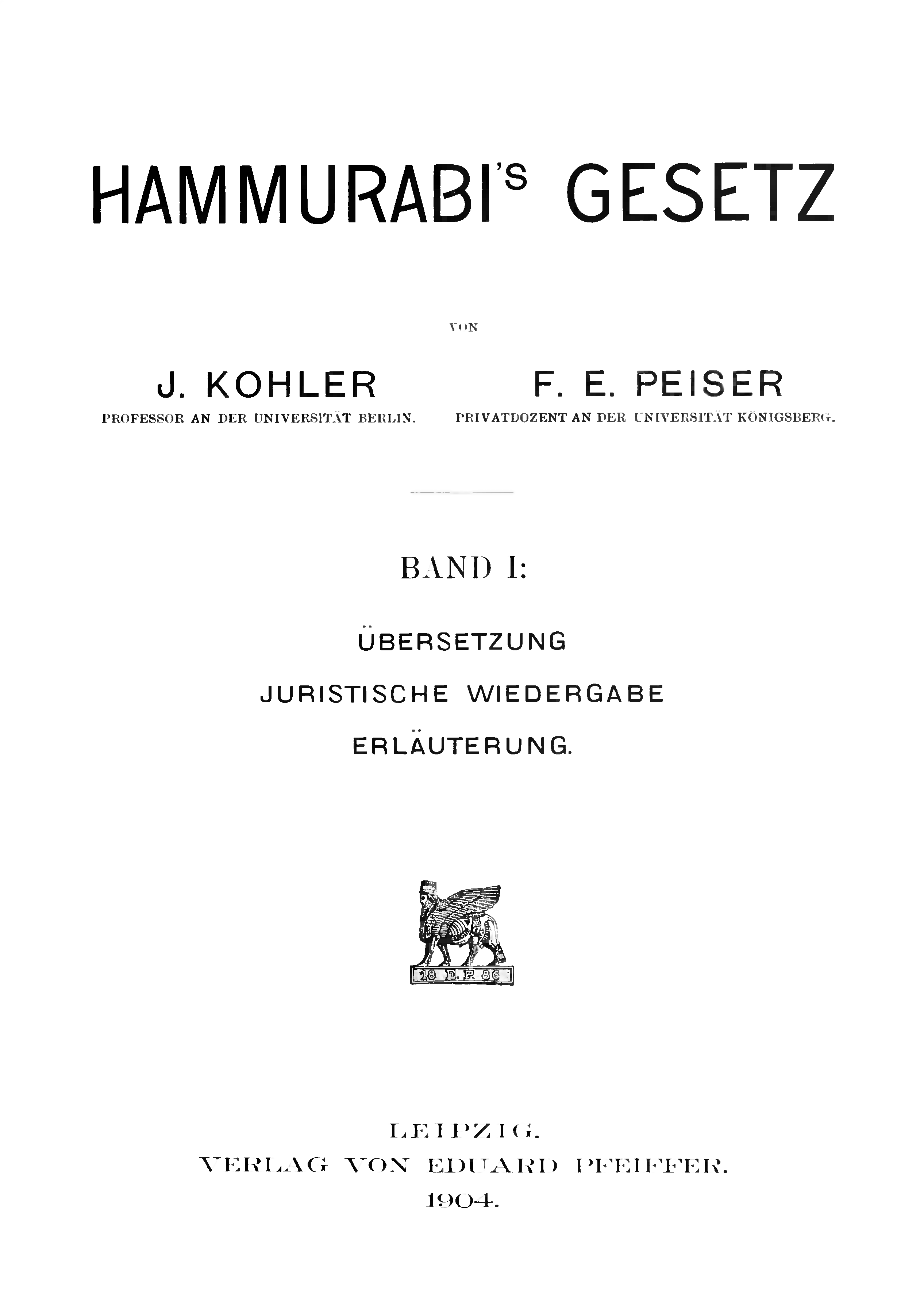 Hammurabi's Gesetz Book's record and author dates